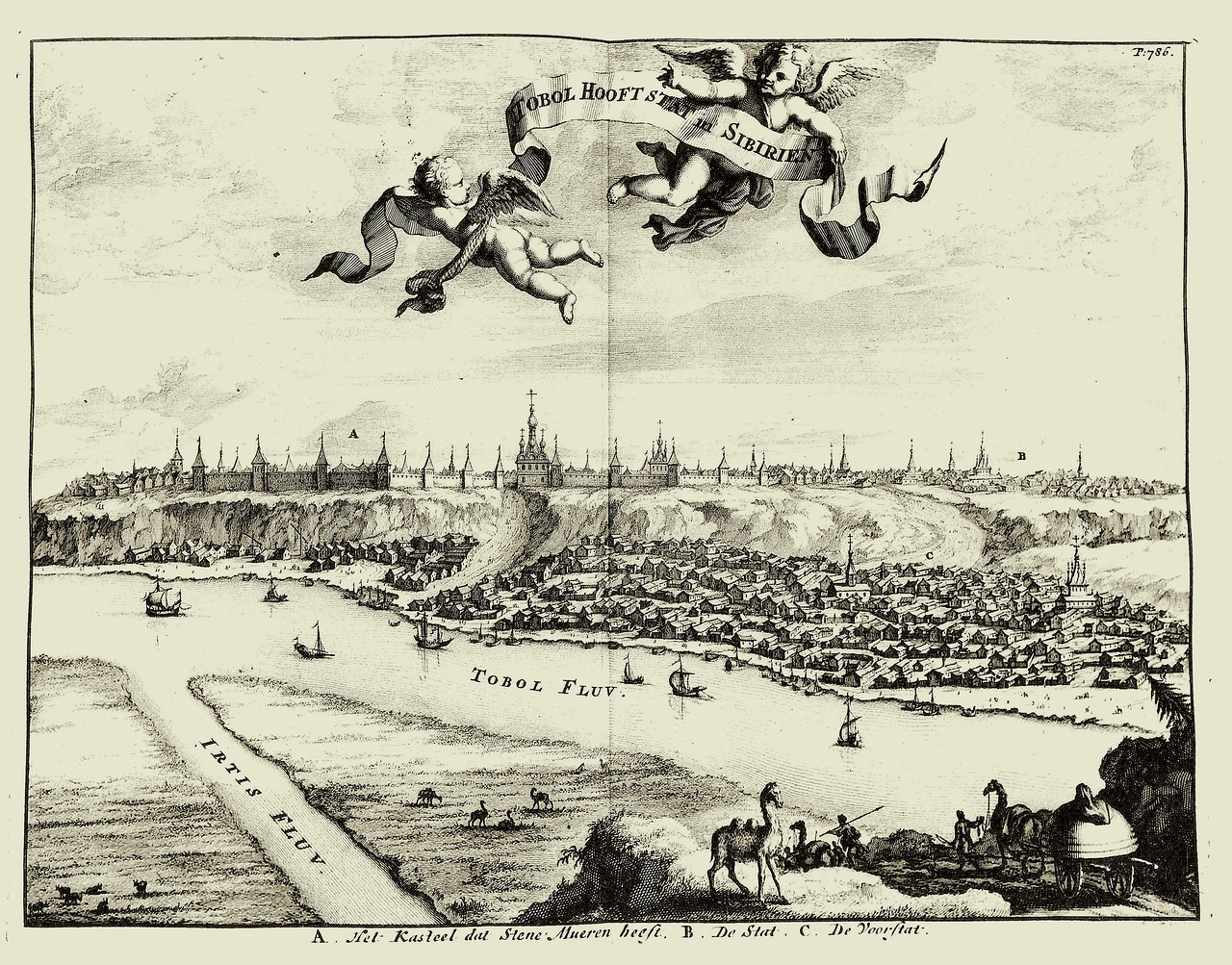 Гравюра с видом на город Тобольск. Дата в правом верхом углу: 1786.